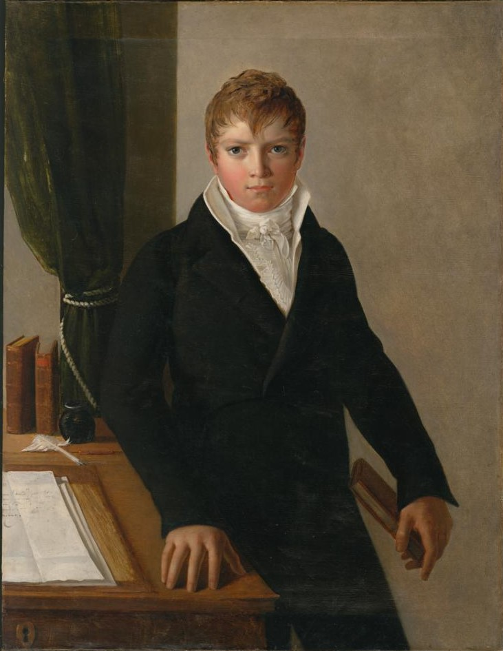 Hans Jakob Oeri: Porträt von Conrad Melchior Hirzel, um 1809. Gemälde : Öl auf Leinwand ; 103,5 x 79cm. Zentralbibliothek Zürich, Inv 175.